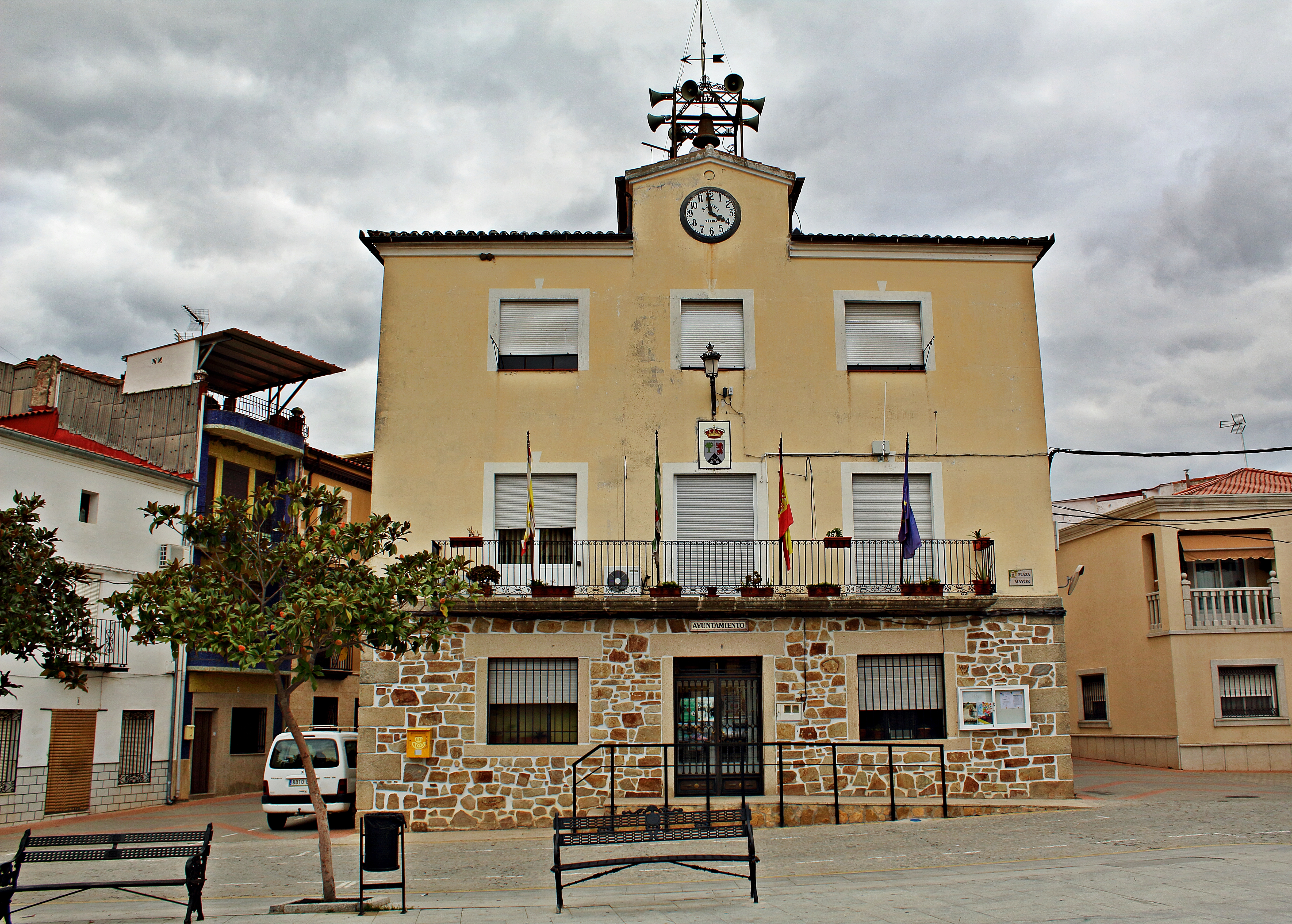 Ahigal, municipio de la comarca de Trasierra-Tierra de Granadilla, provincia de Cáceres